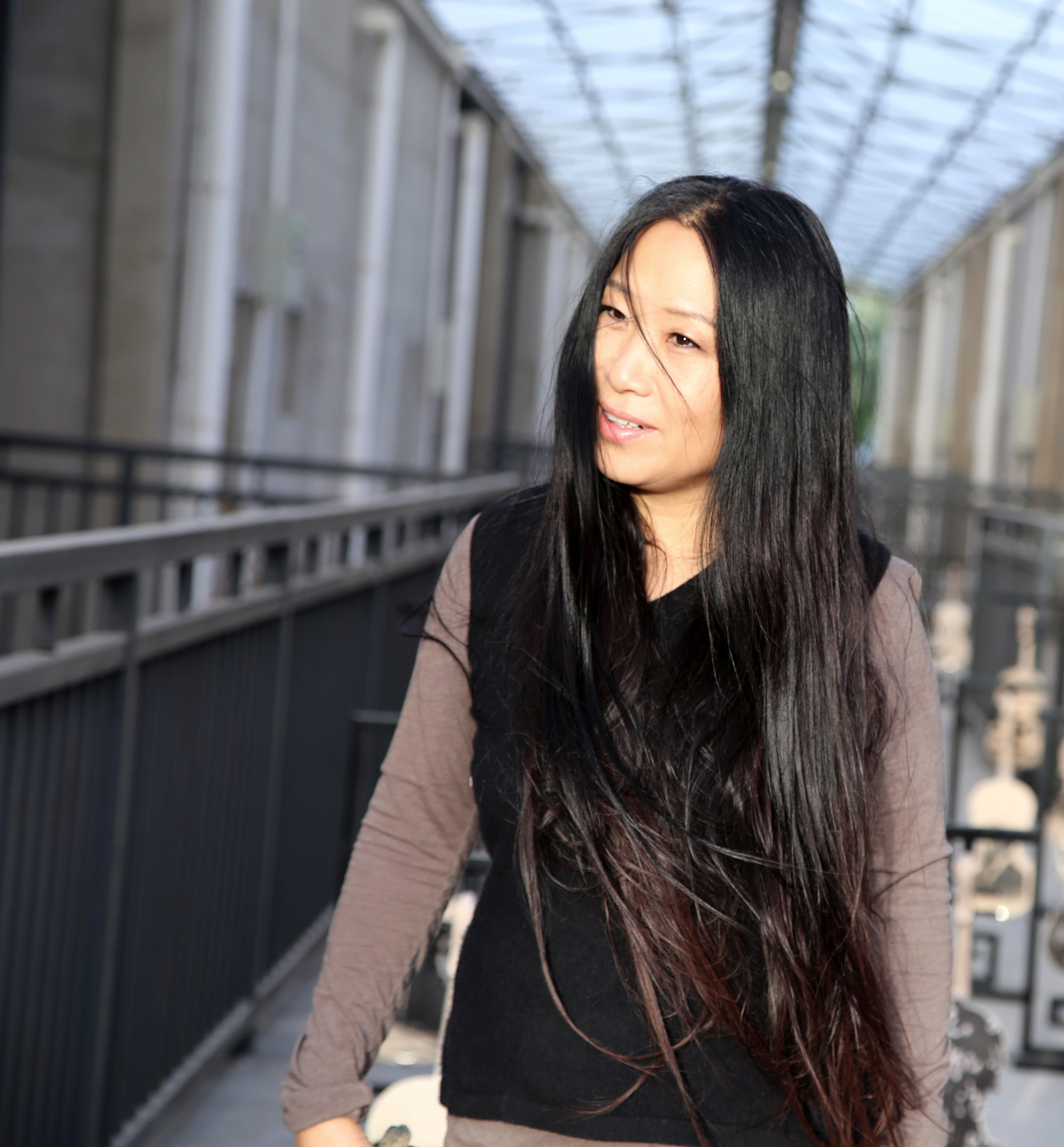 Portrait de Li Chevalier, 2013